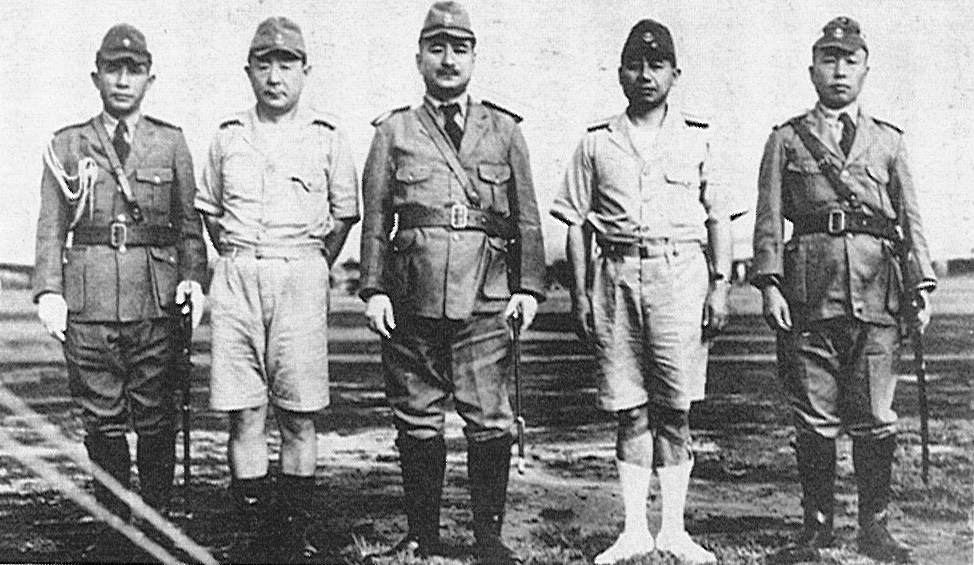 1940年9月の在支海軍航空隊首脳。左から2人目より、1連空司令長官:山口多門少将、支那方面艦隊長官:嶋田繁太郎中将、2連空司令長官:大西瀧治郎少将。